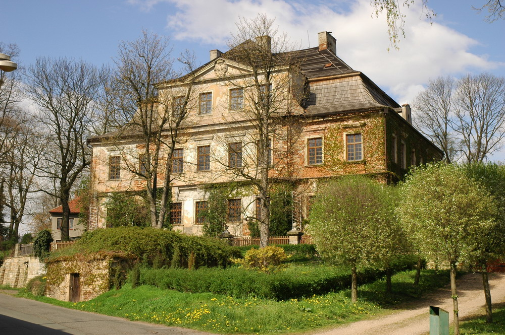 Zámek Neděliště, okres Hradec Králové. Hlavní průčelí.